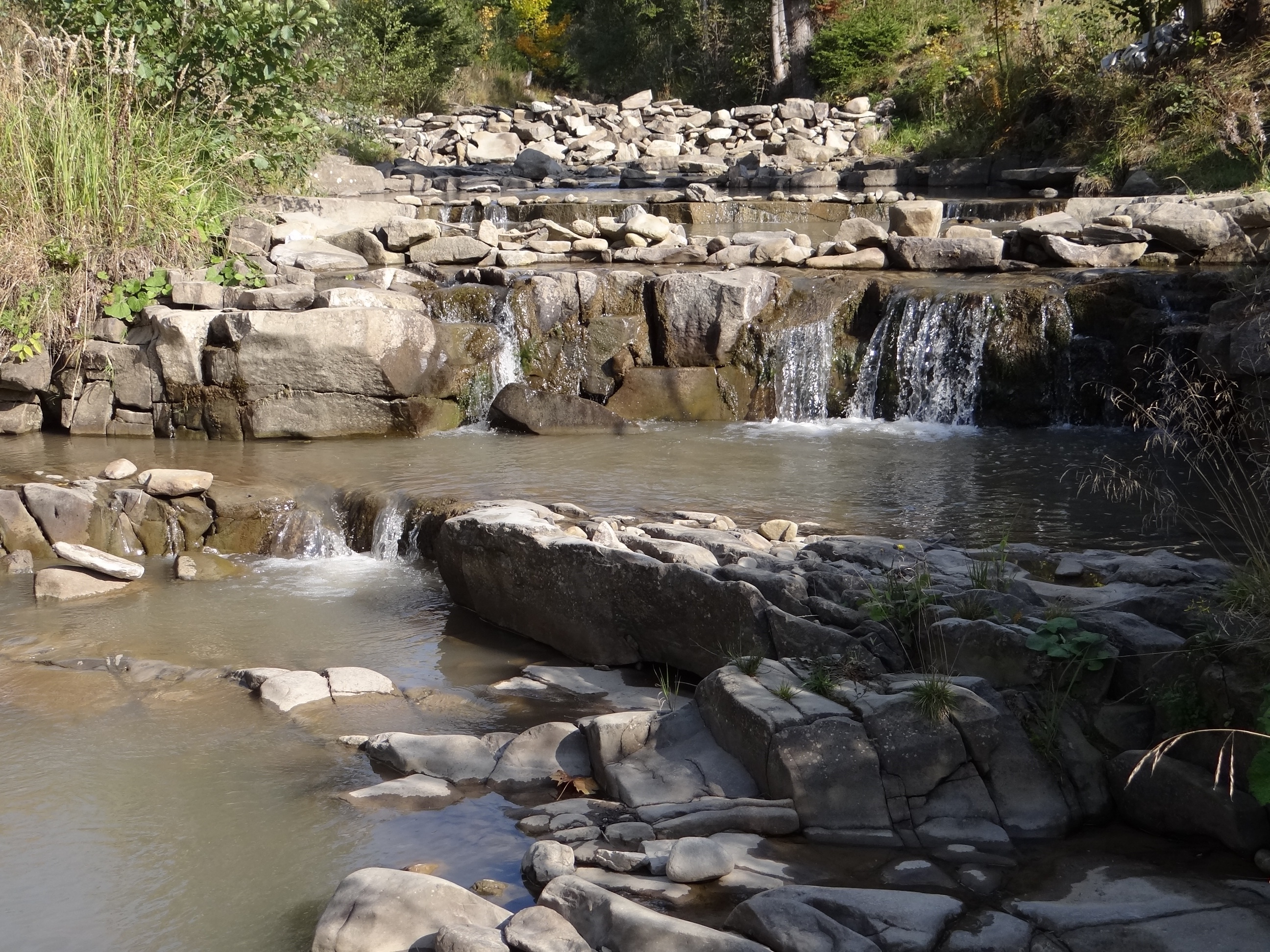 Potok Romanka